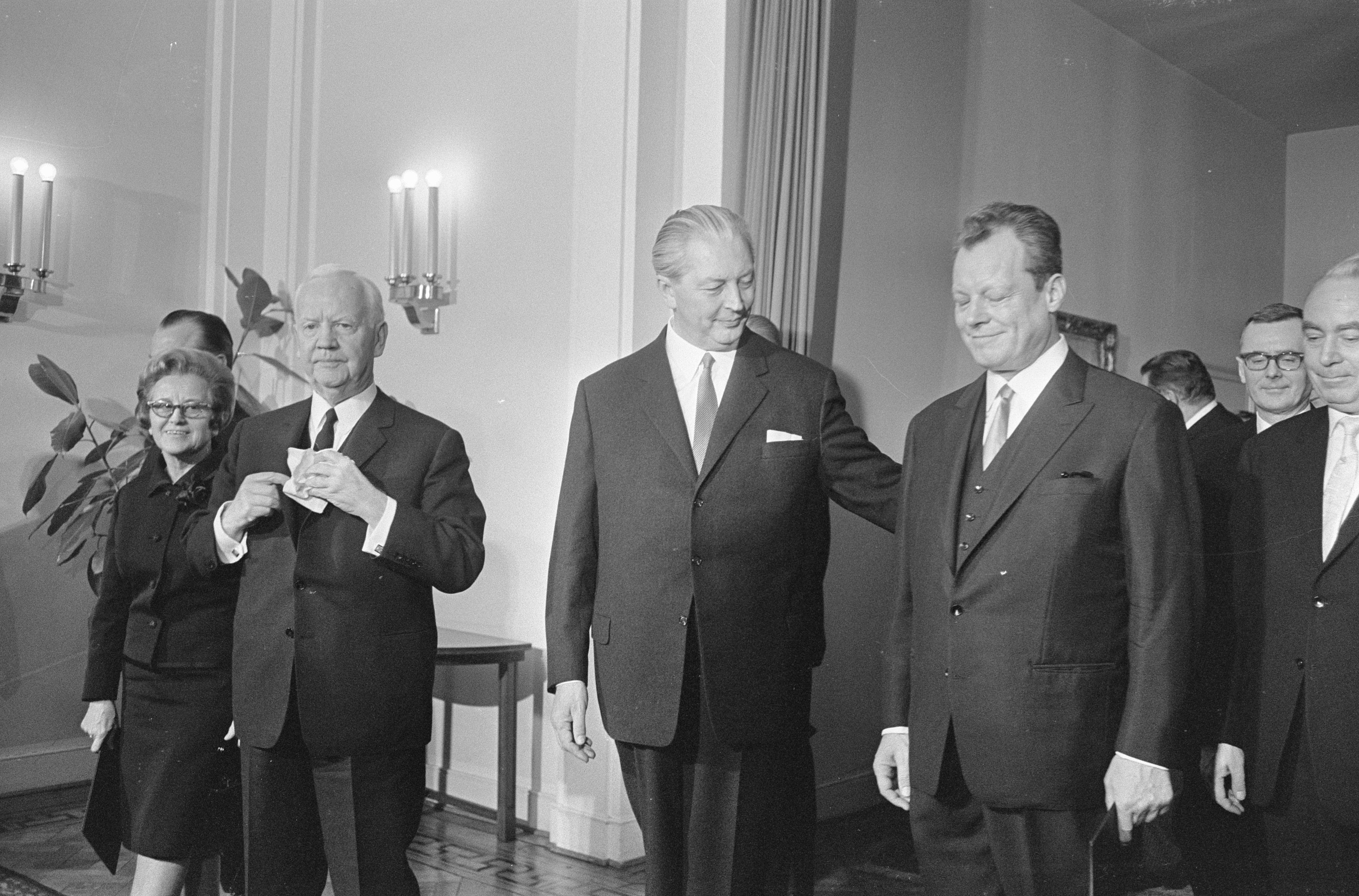 Collectie / Archief : Fotocollectie Anefo Reportage / Serie : Duitsland heeft kabinet Beschrijving : V.l.n.r. Heinrich Lübke, Kurt Georg Kiesinger en Willy Brandt Datum : 1 december 1966 Locatie : Bonn, Duitsland Trefwoorden : ambtsaanvaardingen, politici, politiek, regeringen Persoonsnaam : Brandt, Willy, Kiesinger, Kurt, Lübke, Heinrich Fotograaf : Fotograaf Onbekend / Anefo, [onbekend] Auteursrechthebbende : Nationaal Archief Materiaalsoort : Negatief (zwart/wit) Nummer archiefinventaris : bekijk toegang 2.24.01.05 Bestanddeelnummer : 919-8421